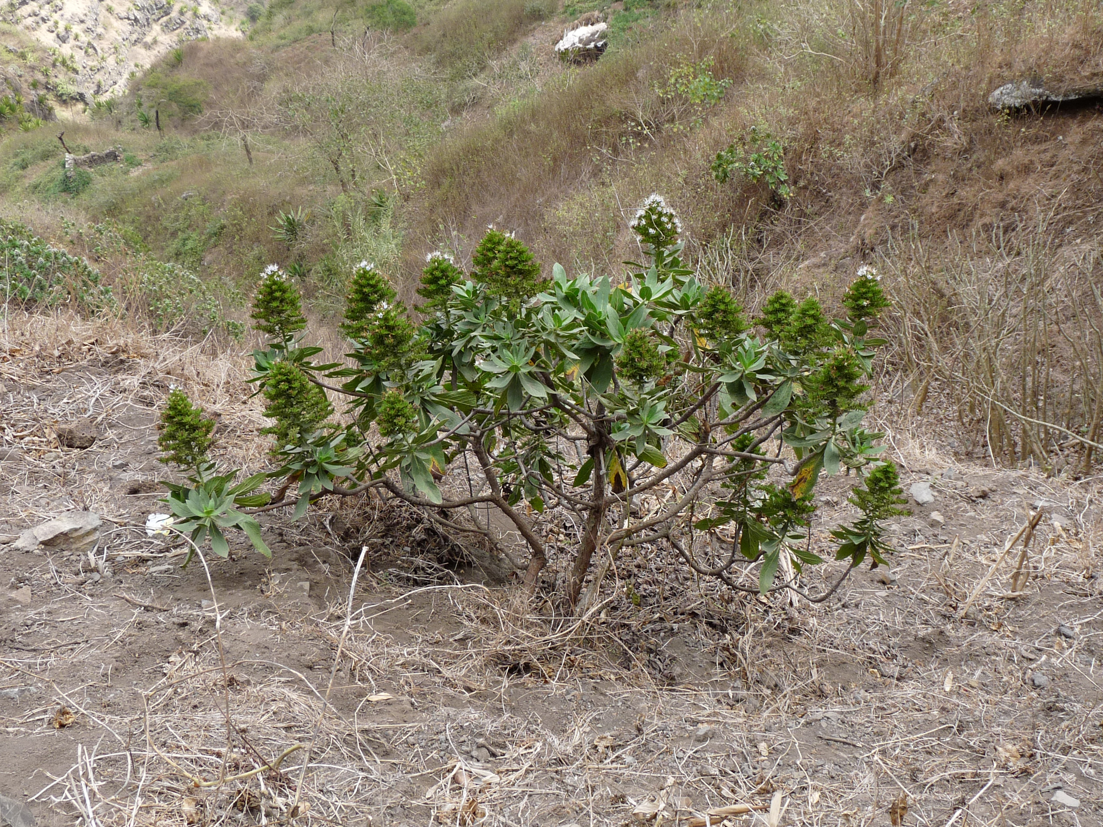 Ribeira Principal (île de Santiago, Cap-Vert) : Echium hypertropicum, espèce endémique